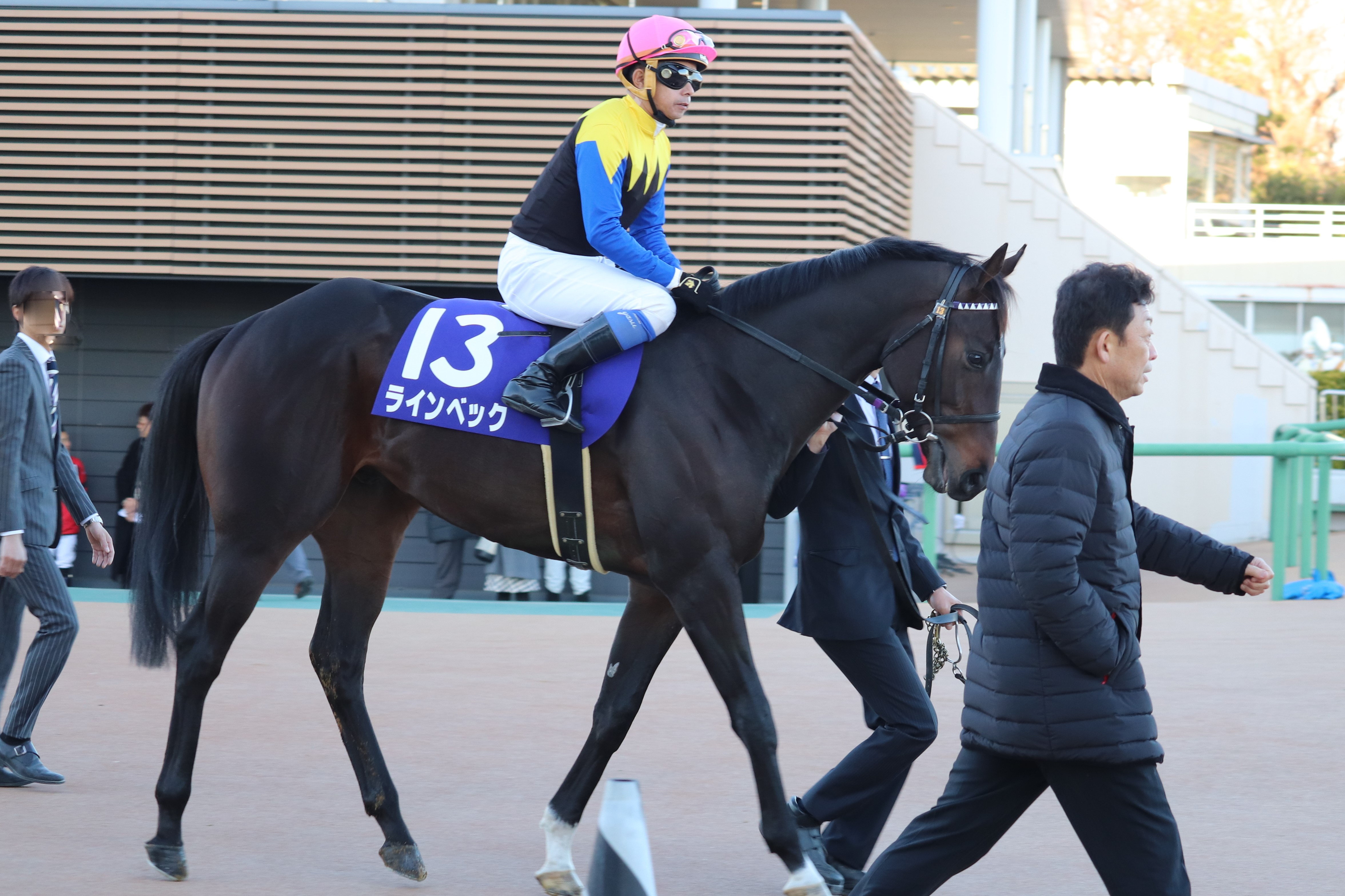 2019年ホープフルステークス、本馬場入場をするラインベック。鞍上:岩田康誠